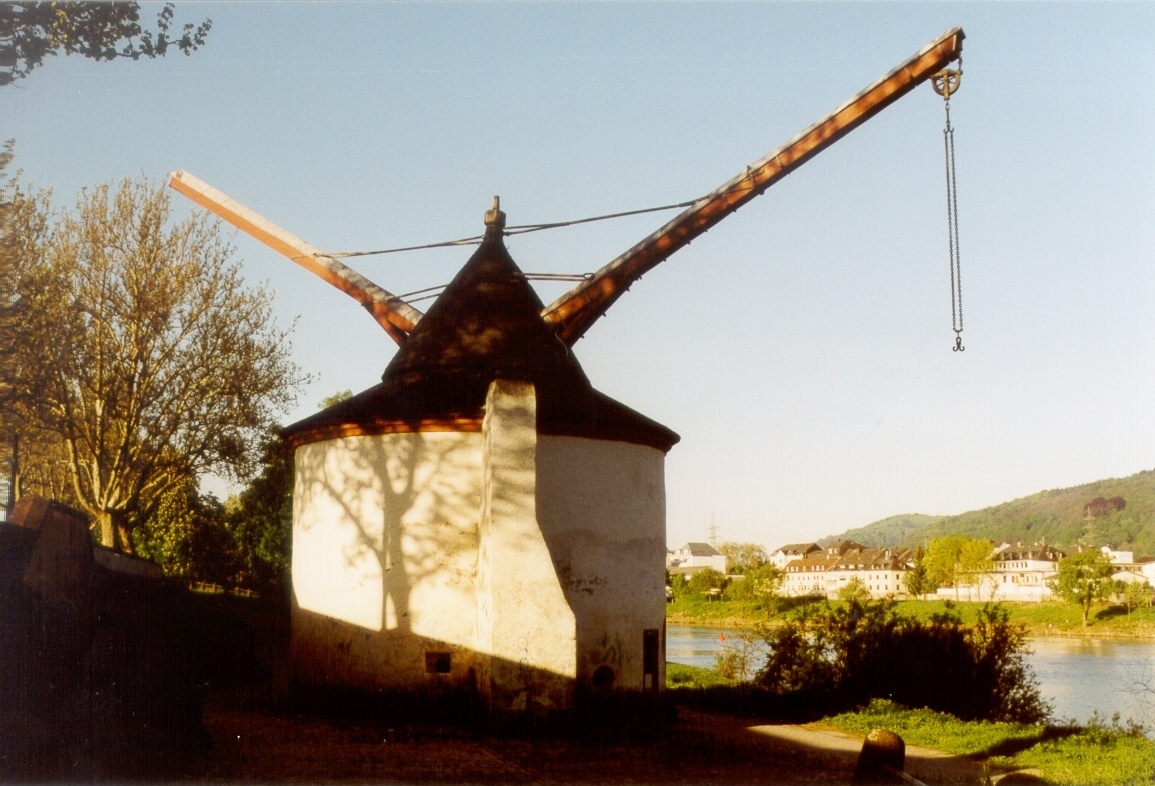 Alter Krahnen, Trier, Germany